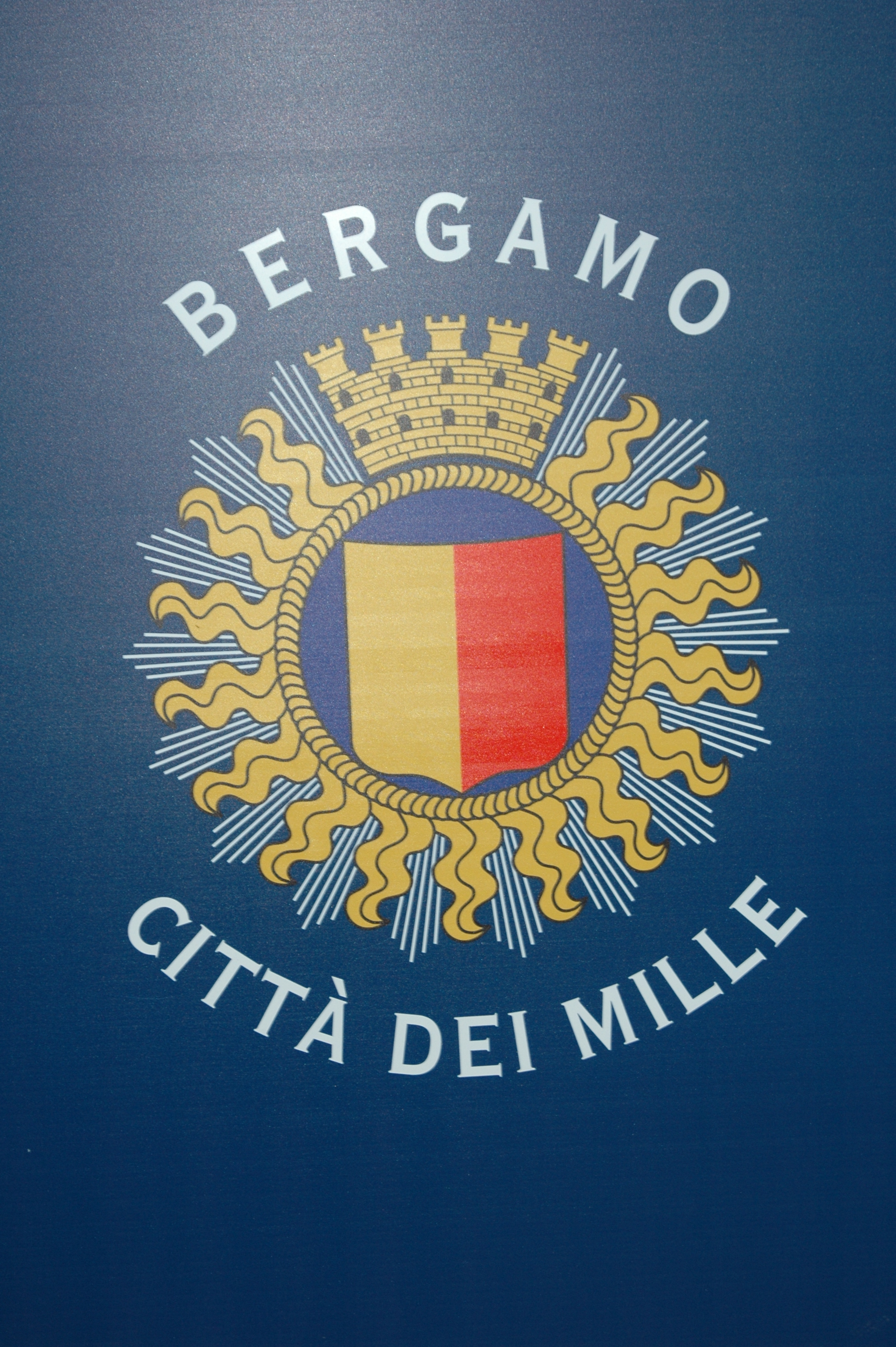 Bergamo, écusson Citta dei mille